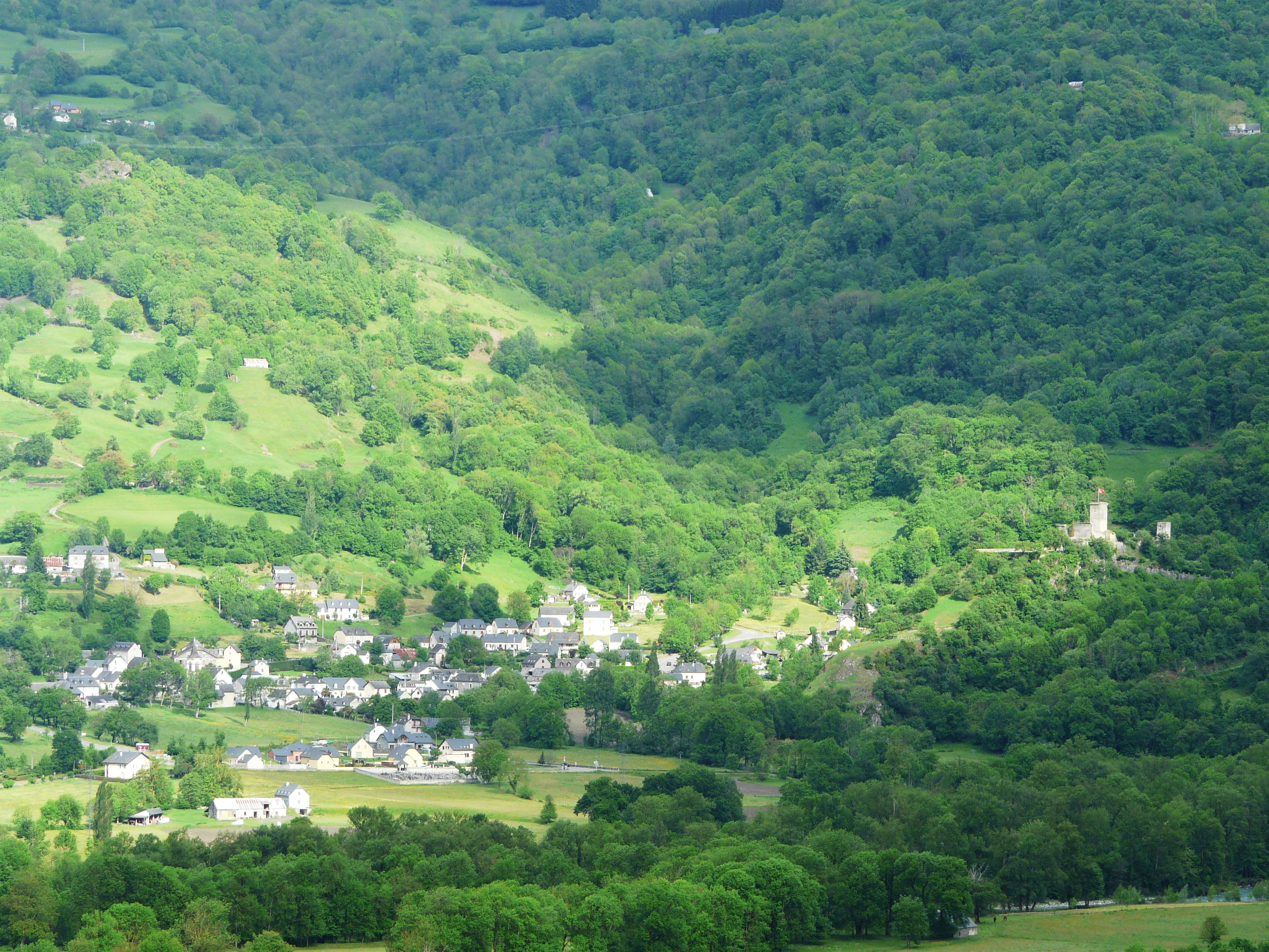 Le village de Beaucens, Hautes-Pyrénées, France. Sur la droite, le château de Beaucens.